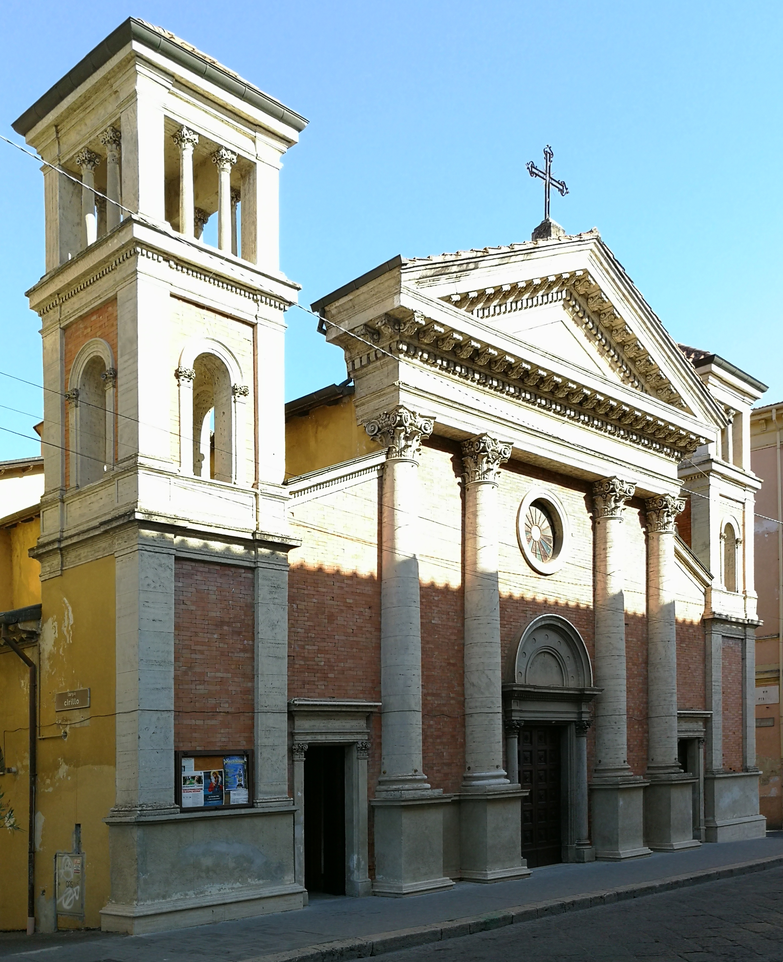 Scorcio della facciata della chiesa di San Bartolomeo in stile neoclassico con coppia di finti campanili laterali